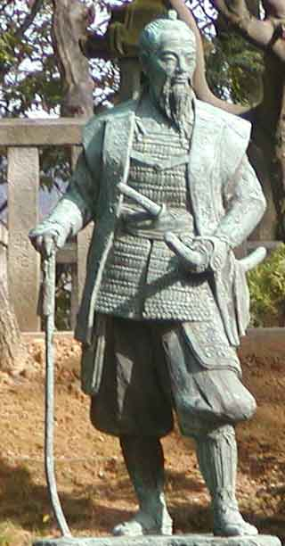 Takeda Kounsai bronze photo by Akimoto